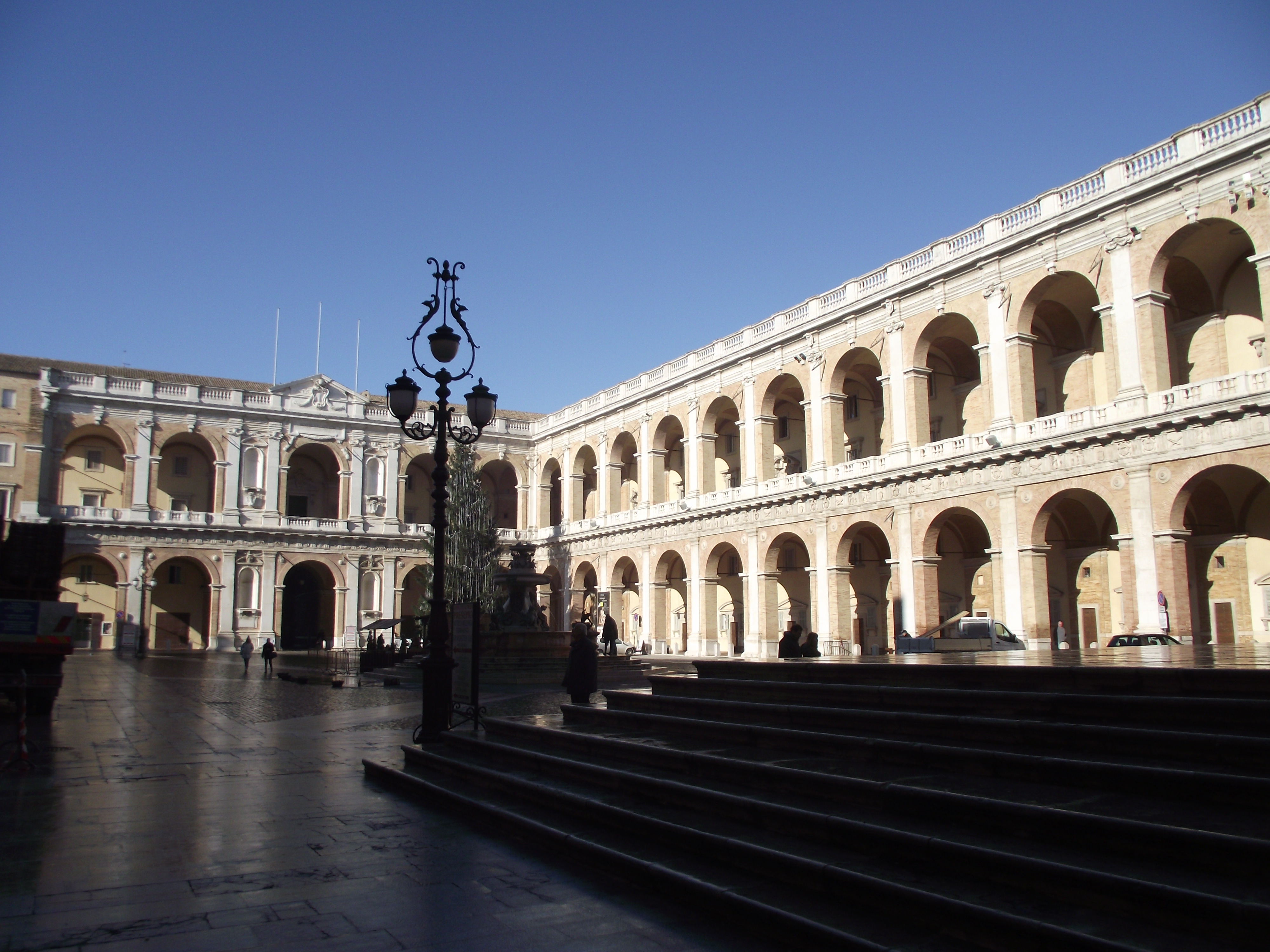 Loreto, Piazza della Madonna, Palazzo Apostolico, D.Bramante